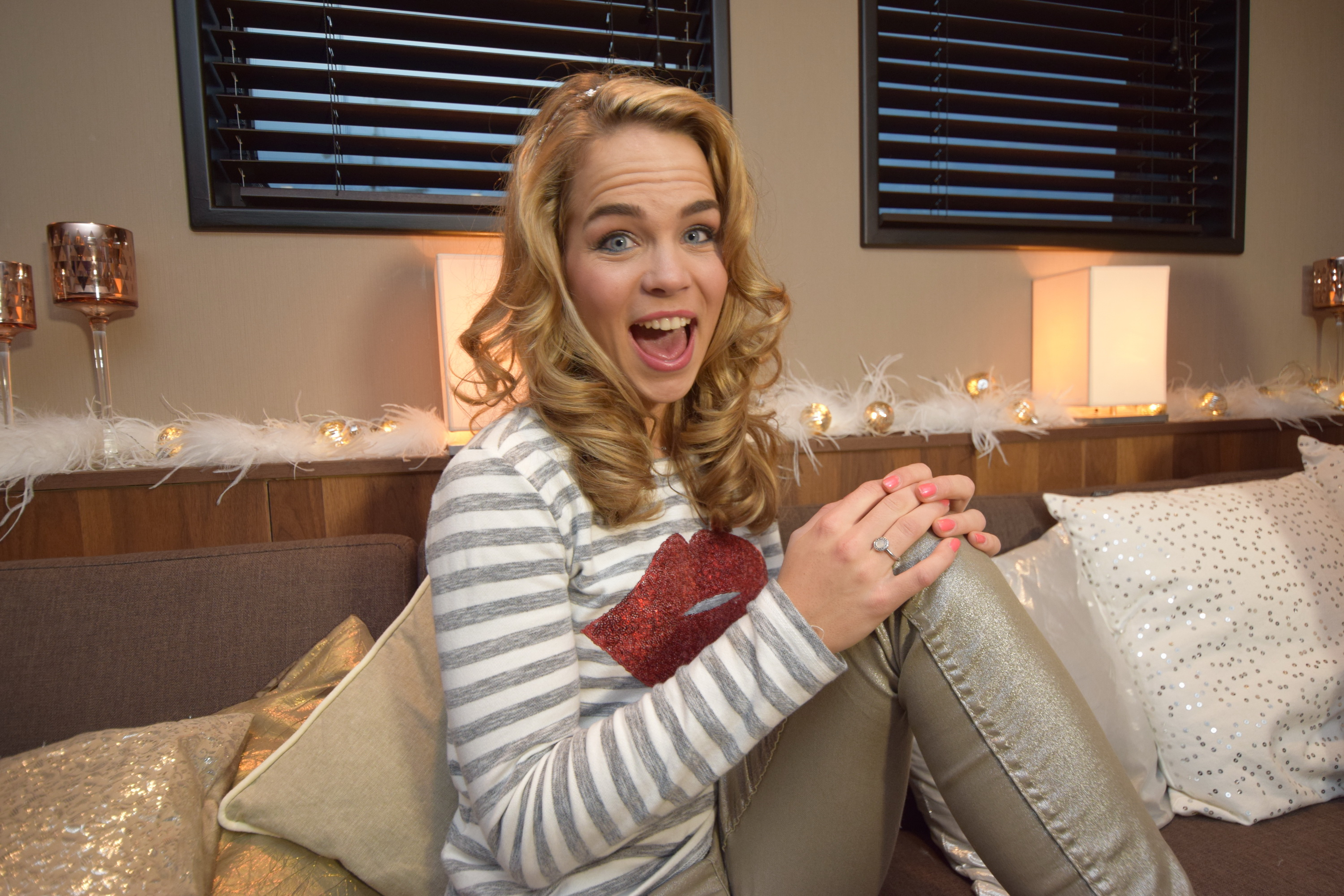 Op woensdag 16 december 2015 gaf de nieuwe K3 interviews naar aanleiding van hun gloednieuwe CD op het jacht Evanna in het Willemdok van Antwerpen.